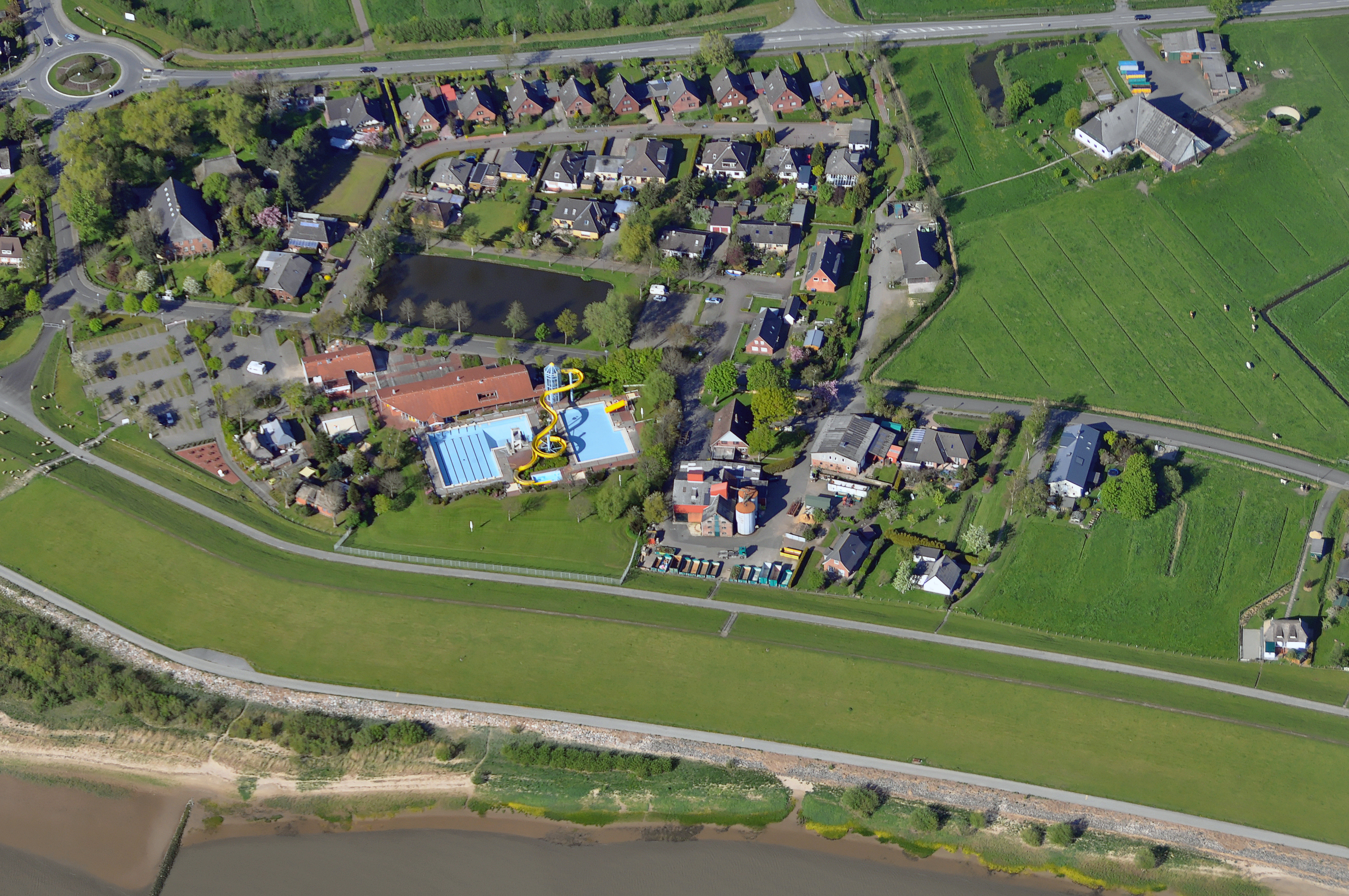 Brokdorf Luftbilder von der Nordseeküste 2012-05